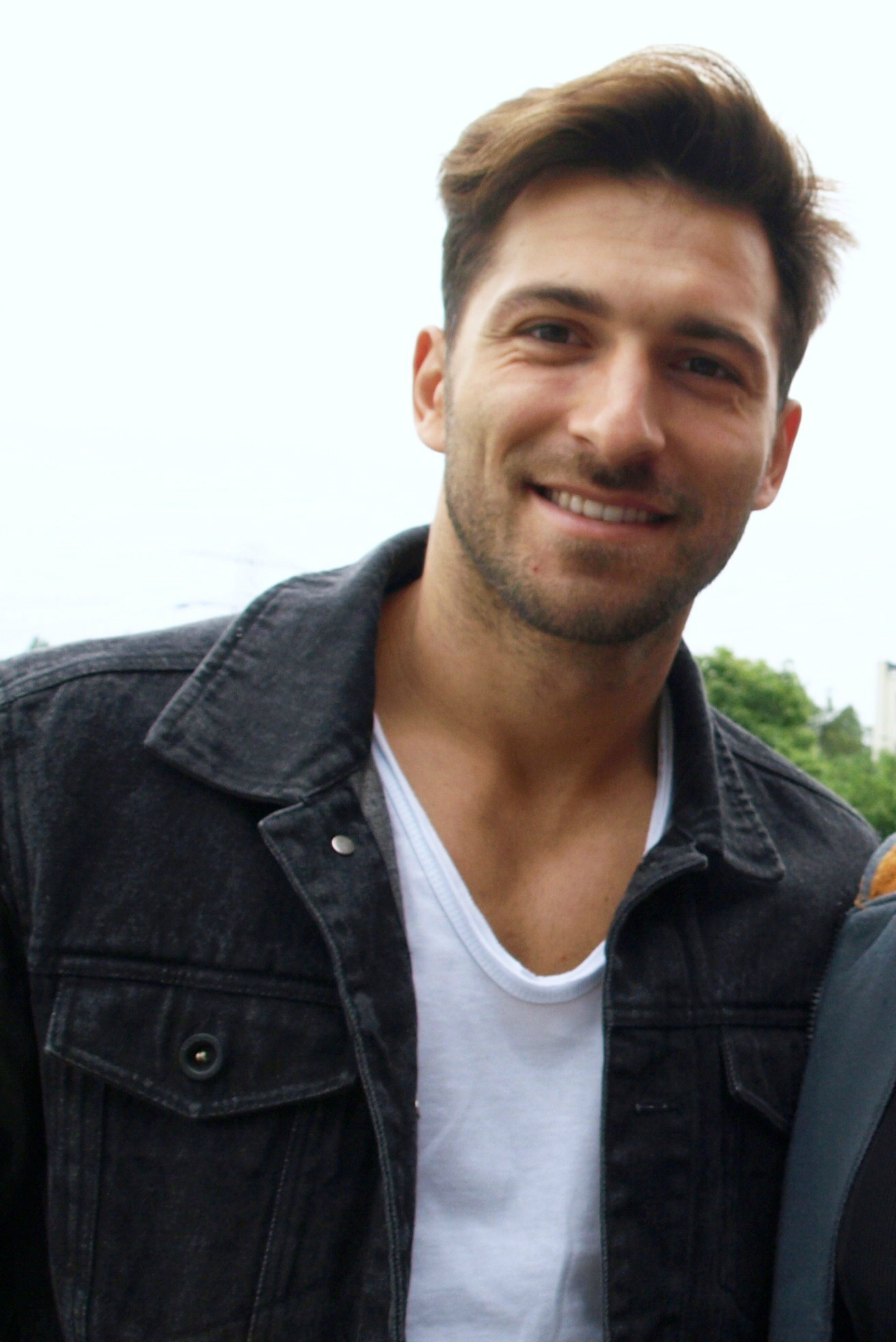 Rafał Maślak, strażak, fotomodel (Mister Polski 2014) i osobowość telewizyjna.